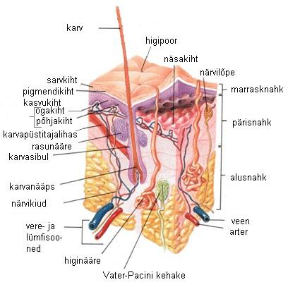 Naha läbilõige